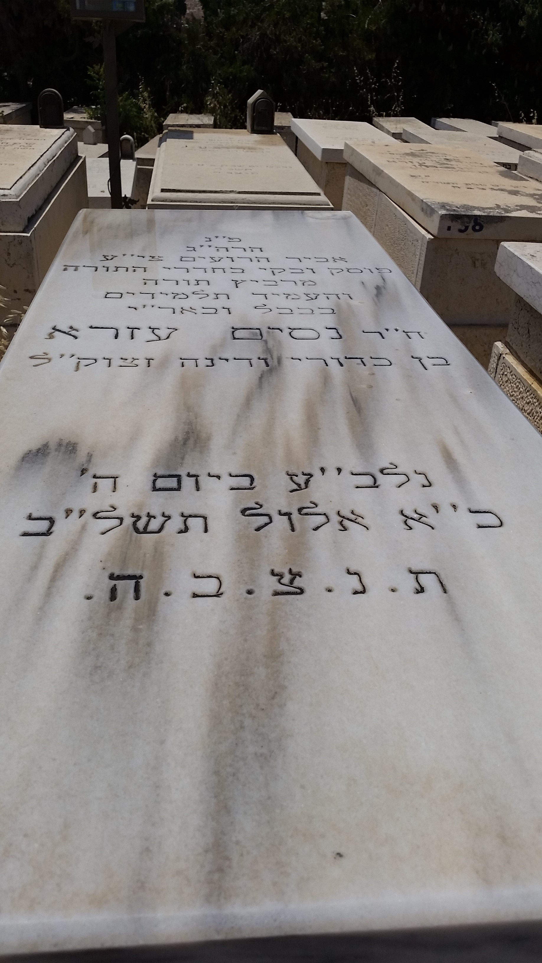 המצבה של הרב ניסים עזרא כדורי